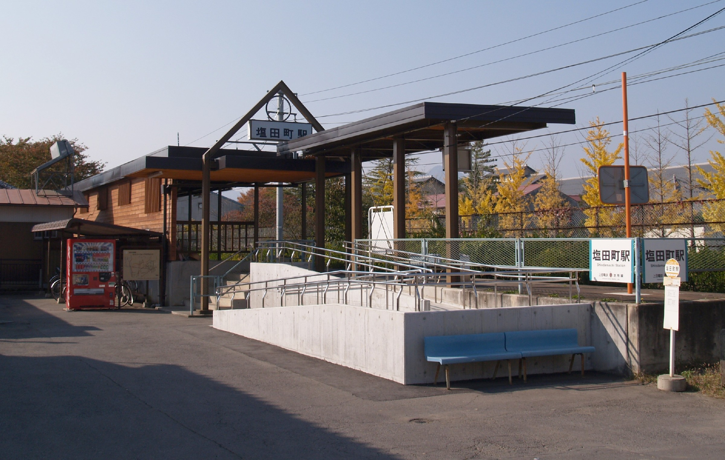 塩田町駅